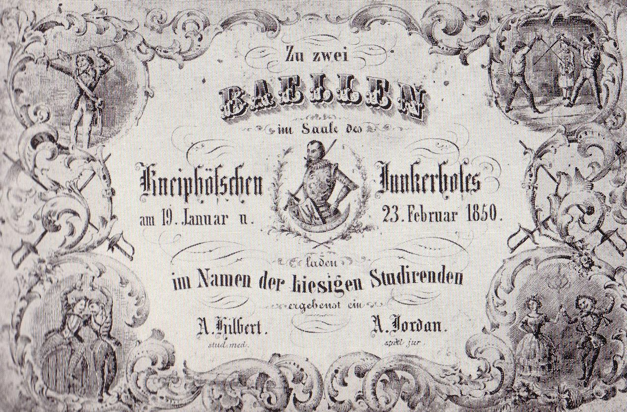 Einladung zum traditionellen Ball der Königsberger Studentenschaft, 1850